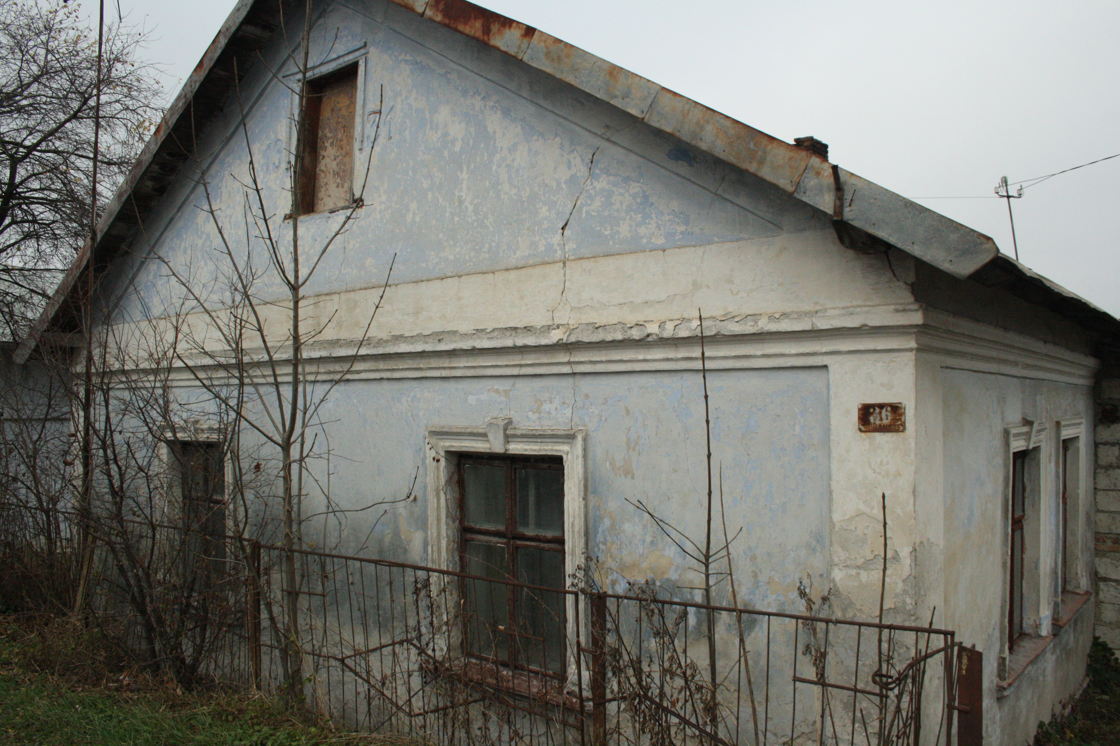 Будинок Карла Рупенхала в Унтервальдені (тепер Підлісне - частина села Підгайчики у Золочівському районі)